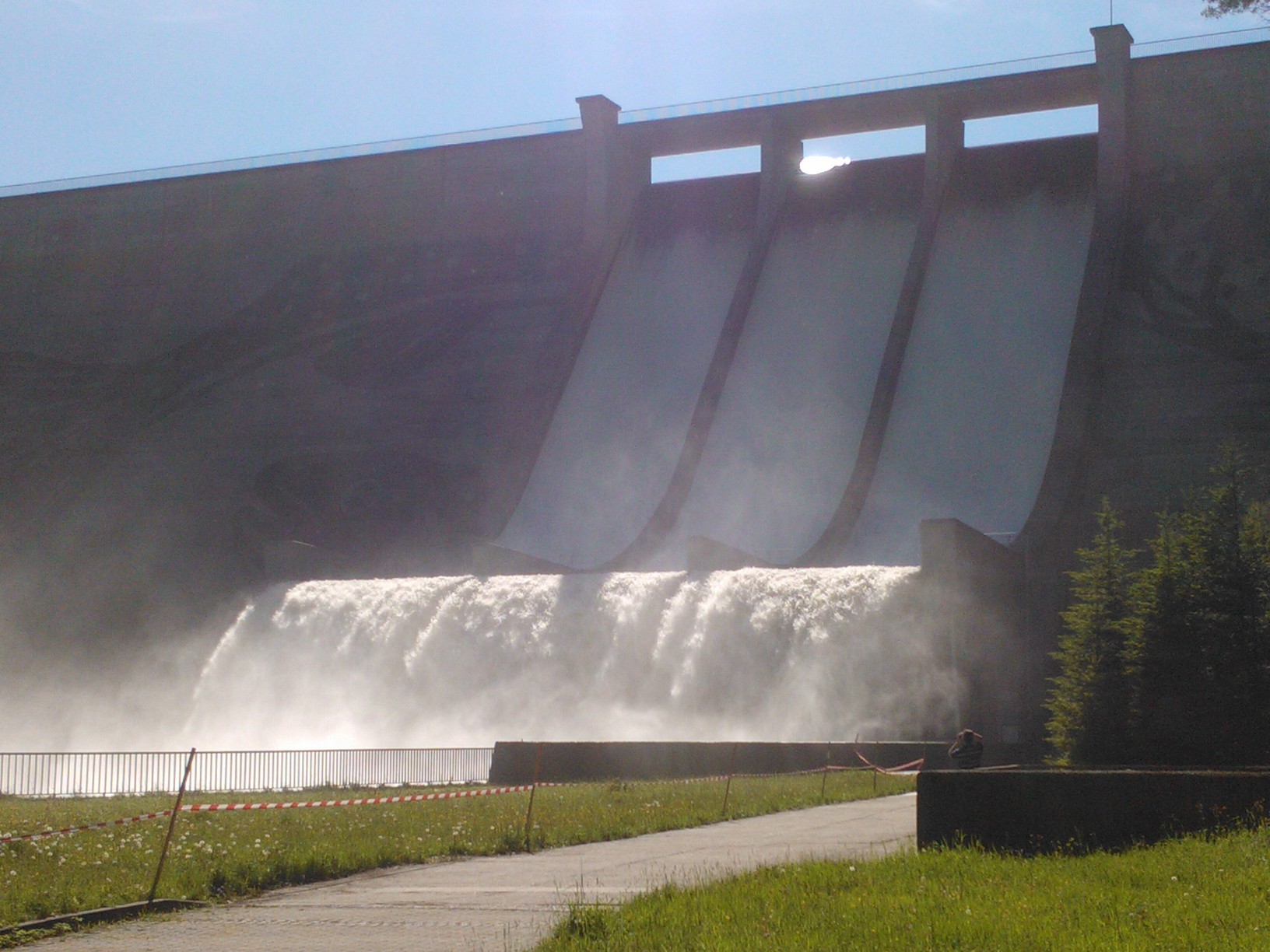 Talsperre Eibenstock: Bei dem Hochwasser auf Grund des Starkregens Anfang Juni 2013 lief die Talsperre über. Foto vom 5. Juni 2013.